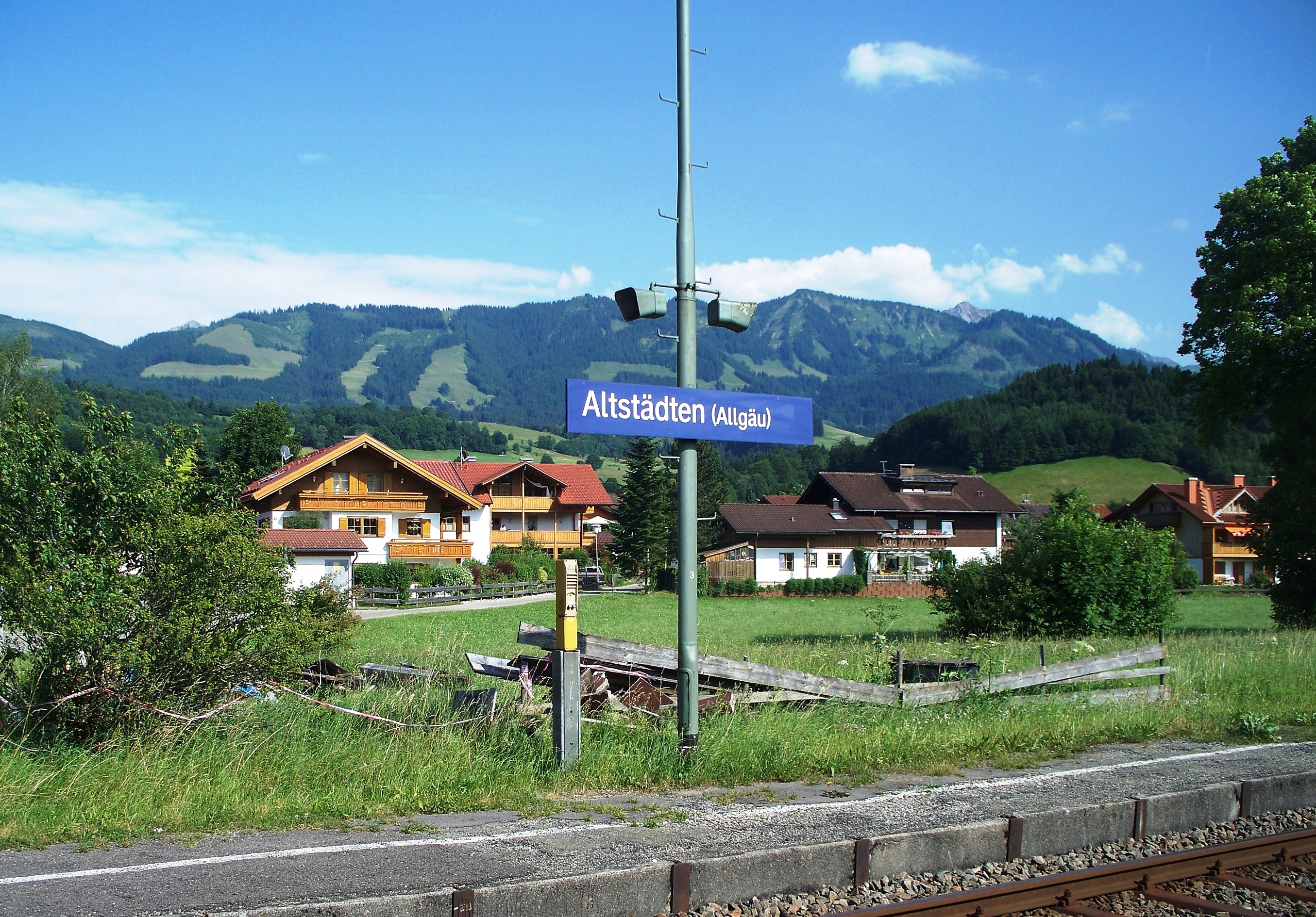 Der Bahnhof von Altstädten; Altstädten ist ein Ortsteil von Sonthofen.